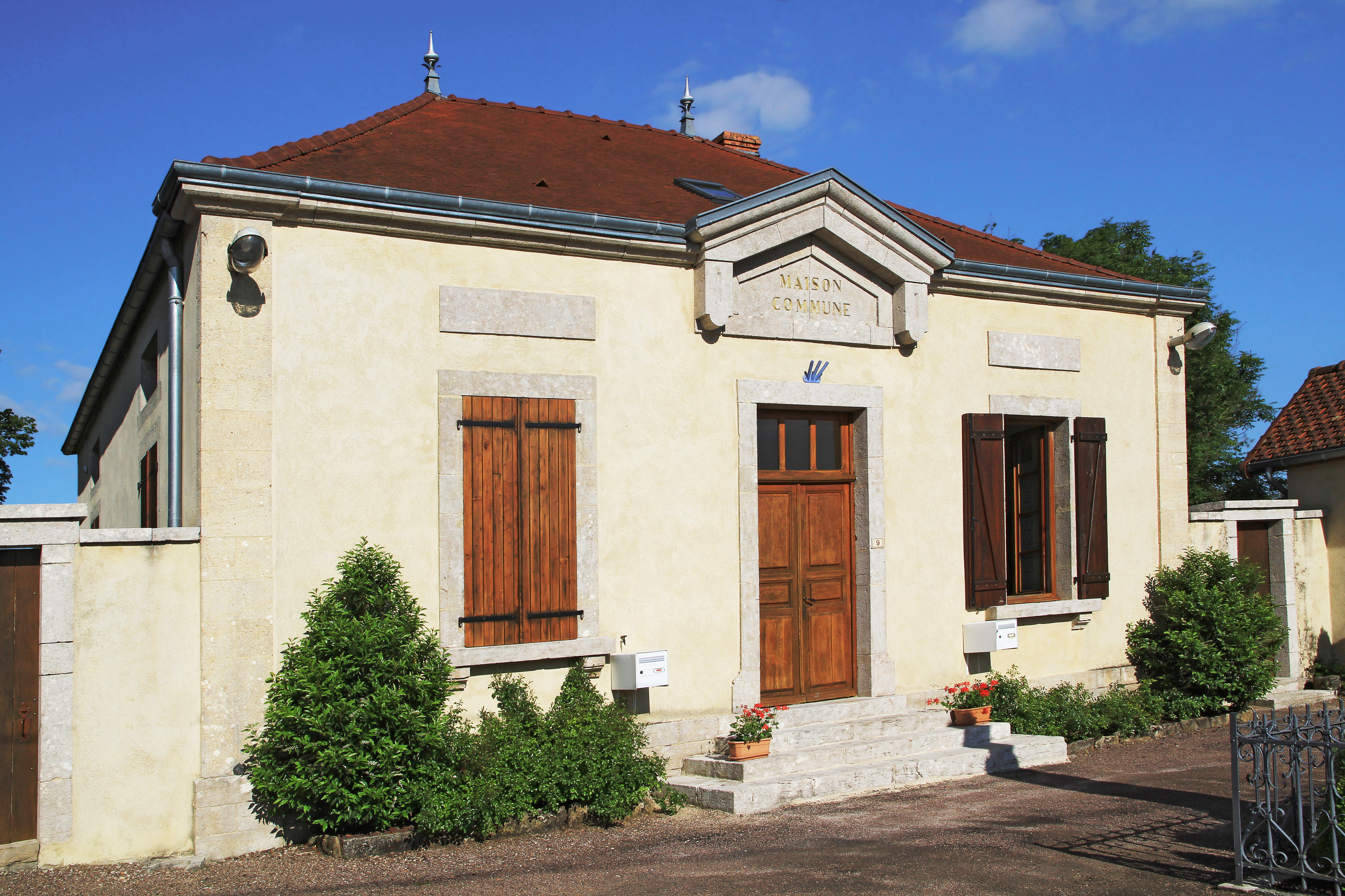 Mairie d'Avosnes